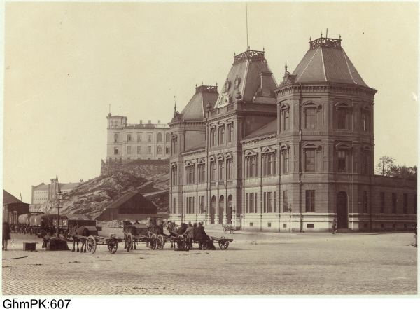 Posthuset vid Packhusplatsen, Göteborg, GhmPK-607